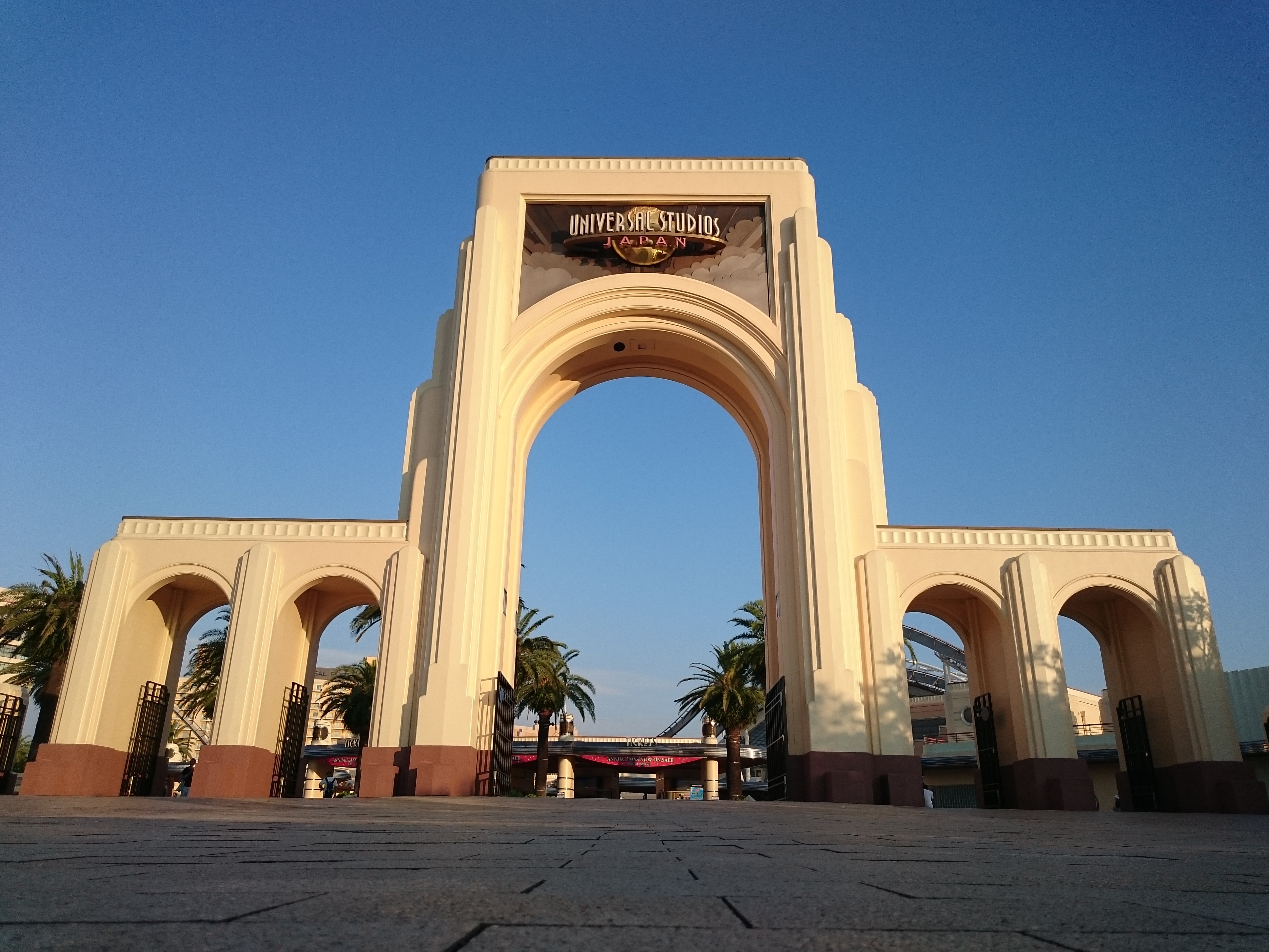 ユニバーサルスタジオジャパンの門 Sony Xperia Z3